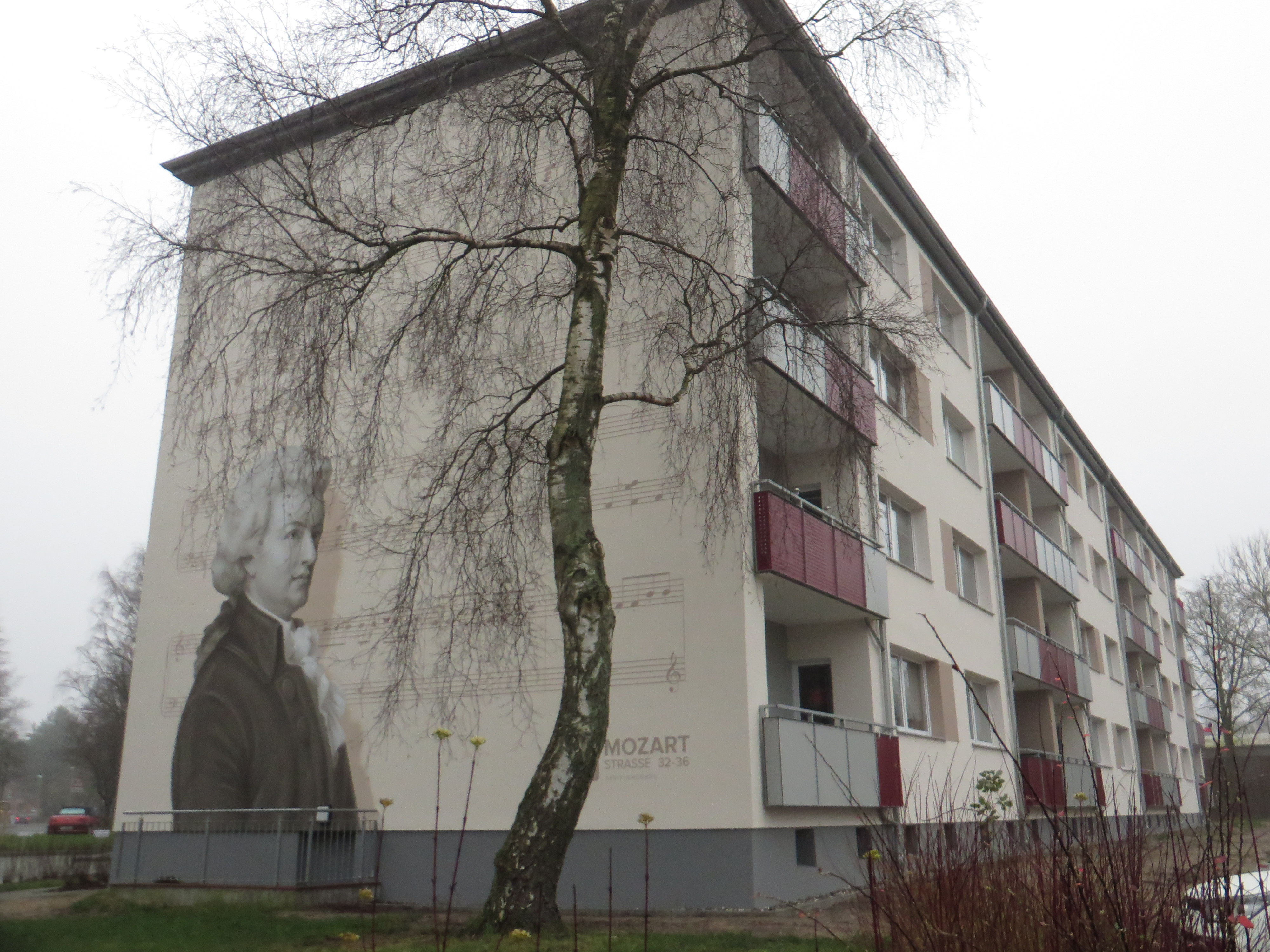 Außenwandmalerei Die Zauberflöte in der Mozartstraße (Flensburg-Musikerviertel 2020-01-02), Bild 04